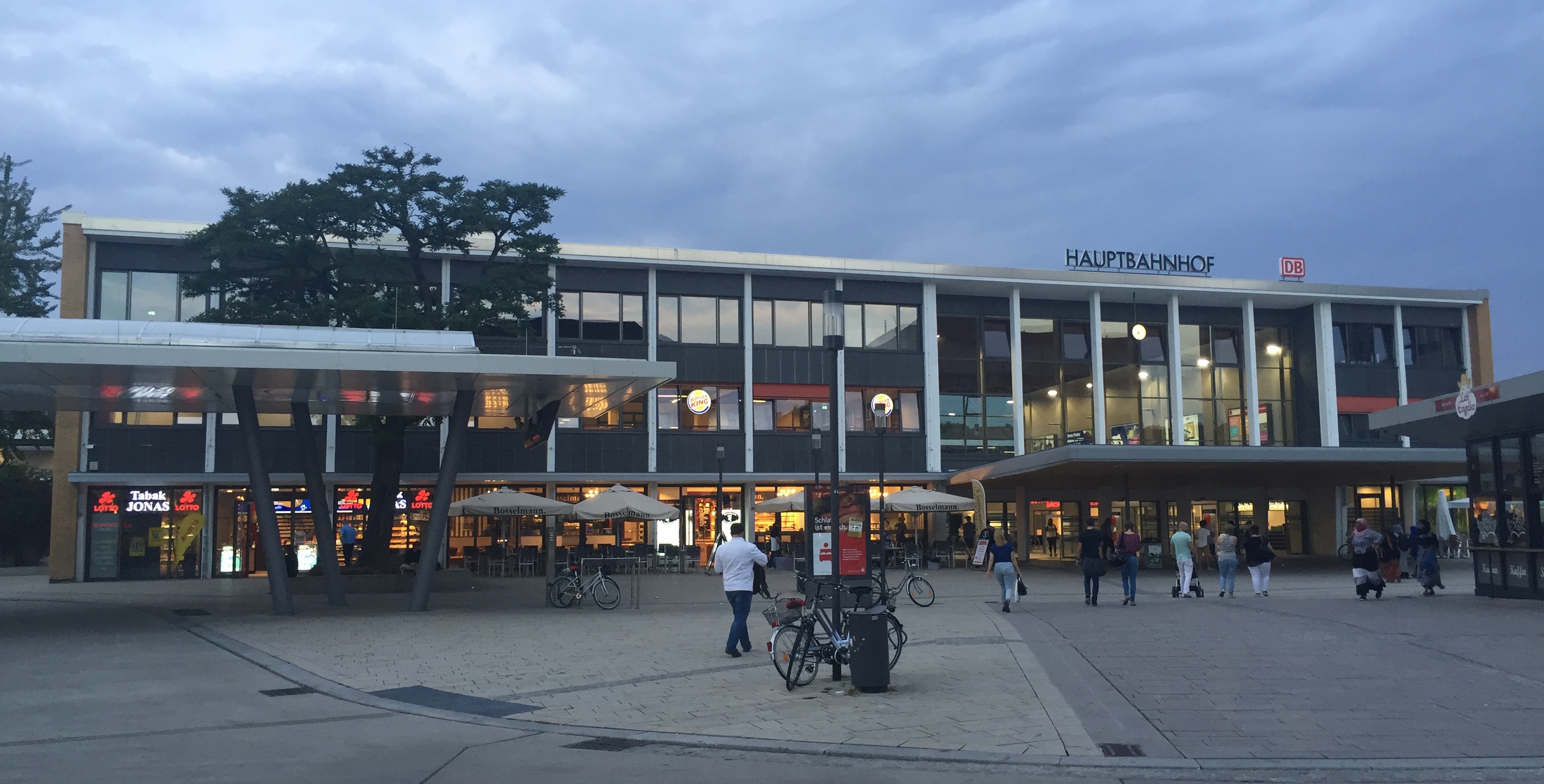 Der Hildesheimer Hauptbahnhof nach Sanierung 2016